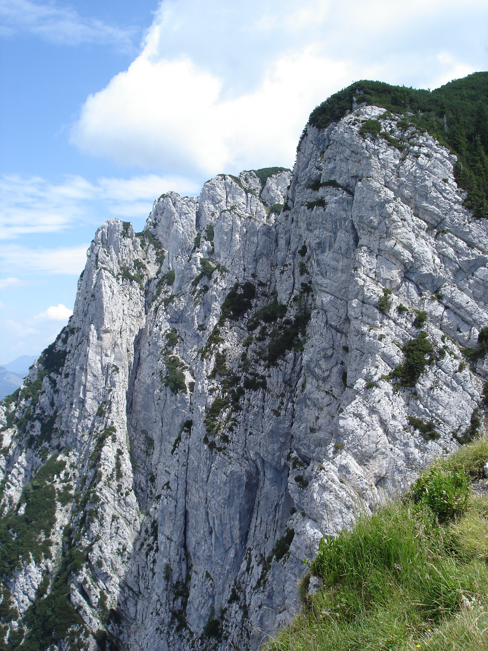 Petersköpfl, Kaisergebirge, von Westen